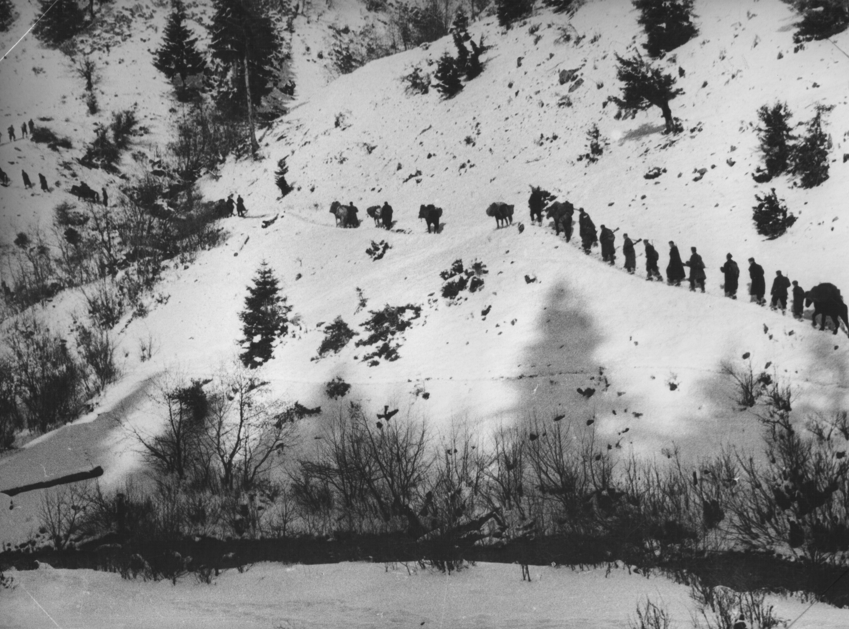 Srpskohrvatski / српскохрватски: Delovi II udarnog korpusa NOVJ prelaze preko Kamene gore kod Prijepolja, da bi sprečili nadiranje Nemaca ka Pljevlji, u zimu 1943. godine.